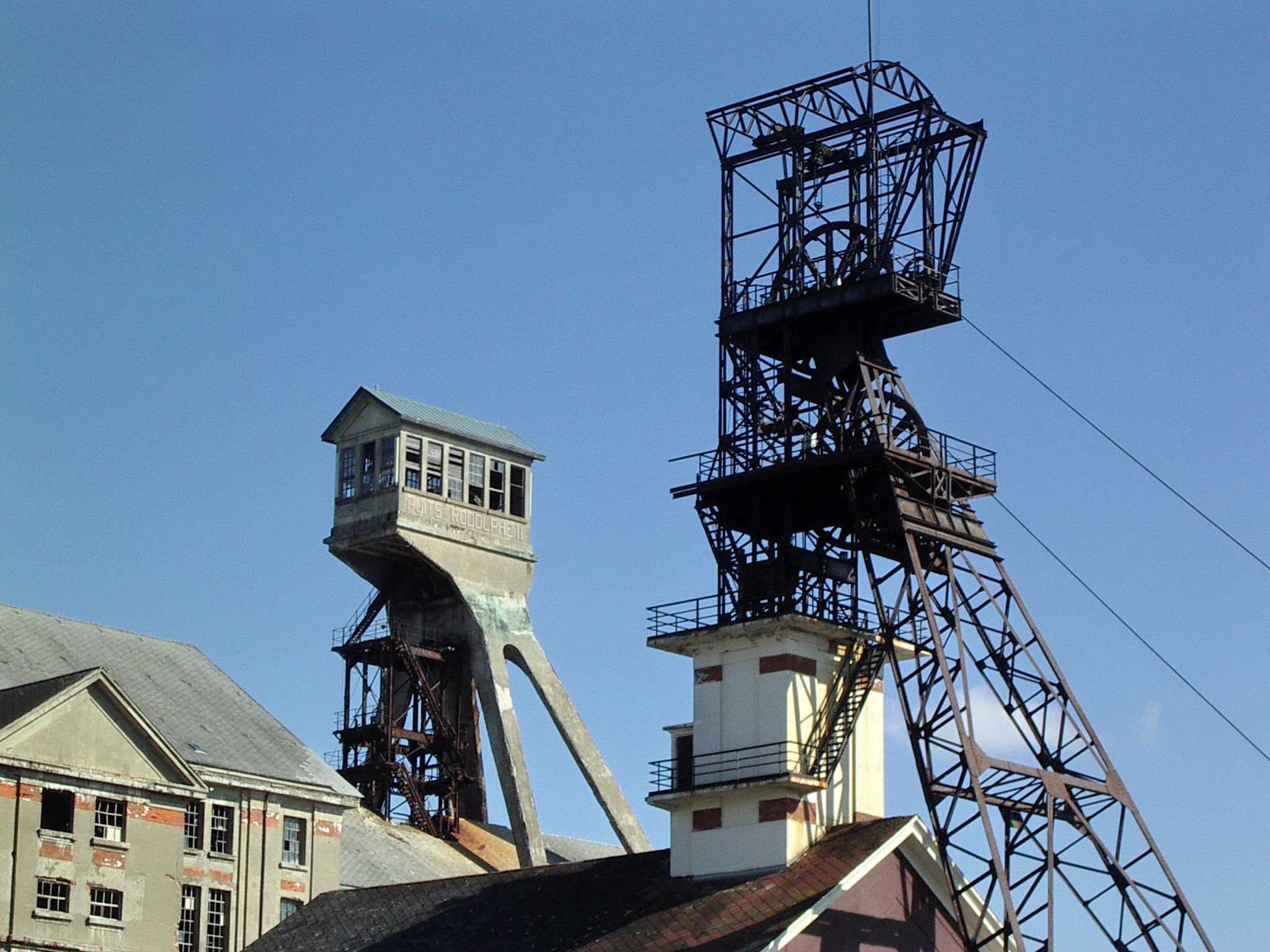 Vestiges des mines de potasse d'Alsace : le carreau Rodolphe à Pulversheim et Ungersheim, Haut-Rhin, Alsace, France. Les chevalements Rodolphe 1, en acier, et Rodolphe 2, en béton.